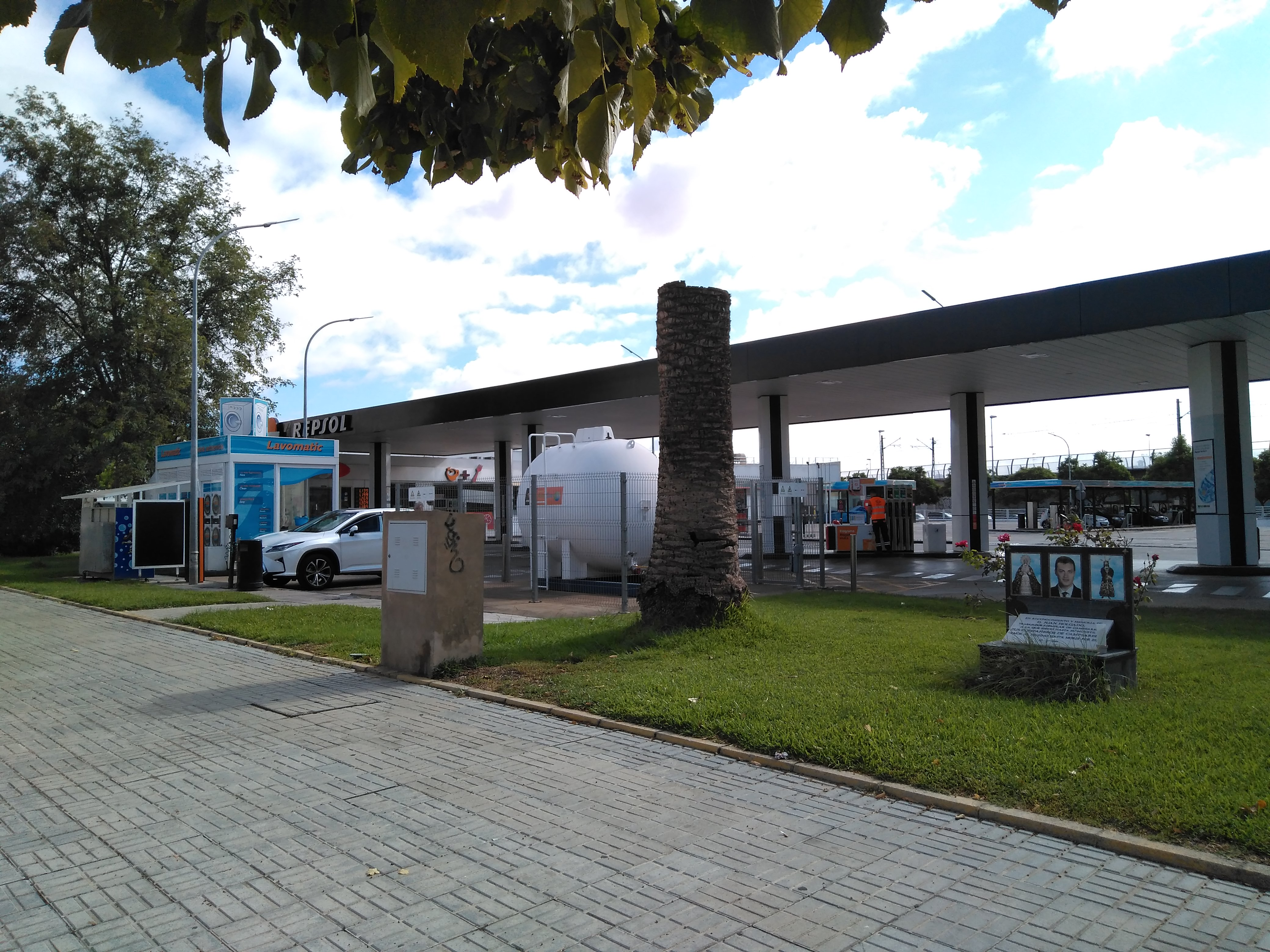 Gasolinera donde fue asesinado Juan Holgado, que dió lugar al suceso del "Padre Coraje", en Jerez de la Frontera